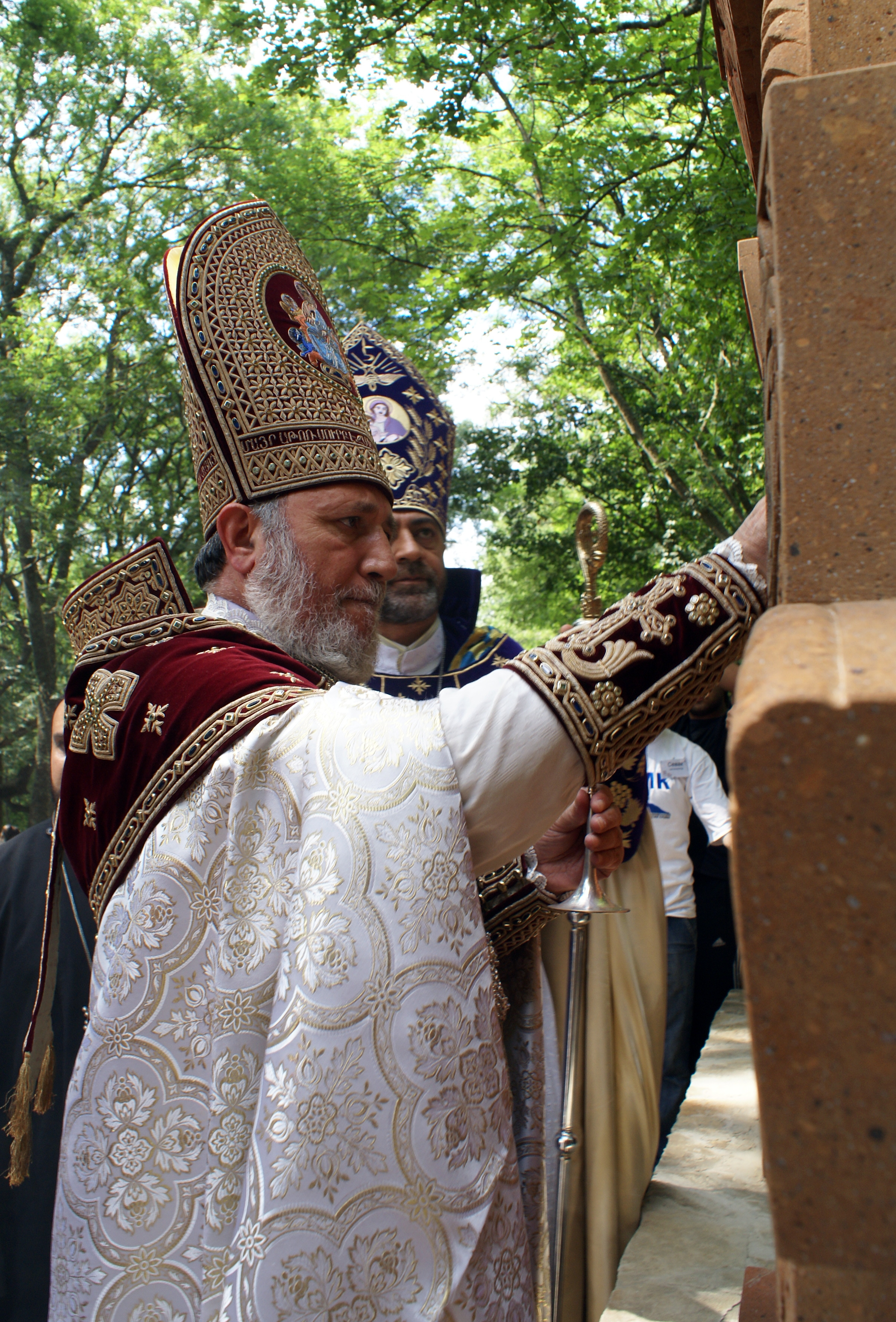 Гарегин II освящает семь хачкаров с буквами названия монастыря Сурб Хач в Крыму 29 июля 2008 года в ходе празднования 650-летия церкви Сурб Ншан монастыря Сурб Хач.